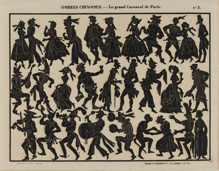 Planche d'ombres chinoises avec des personnages du "Grand Carnaval de Paris".